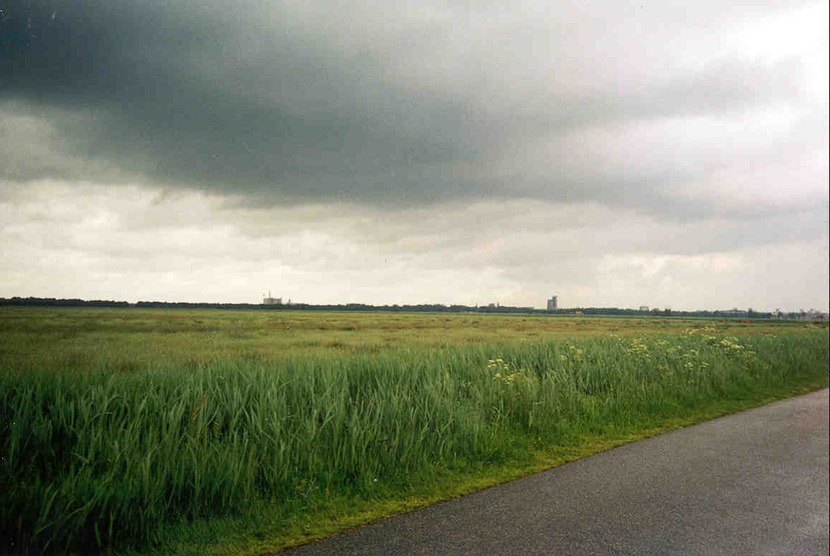 Peizerwolde, onderdell van de Peizermade